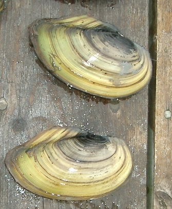 Anodonta cygnea (latin), swan mussel (en), Större dammussla (sv) from Sweden